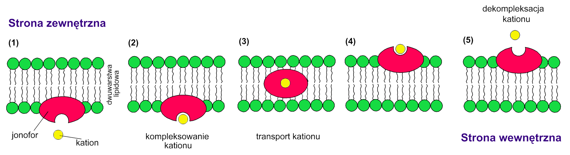 Mechanizm transportu jonów przez jonofory nośnikowe